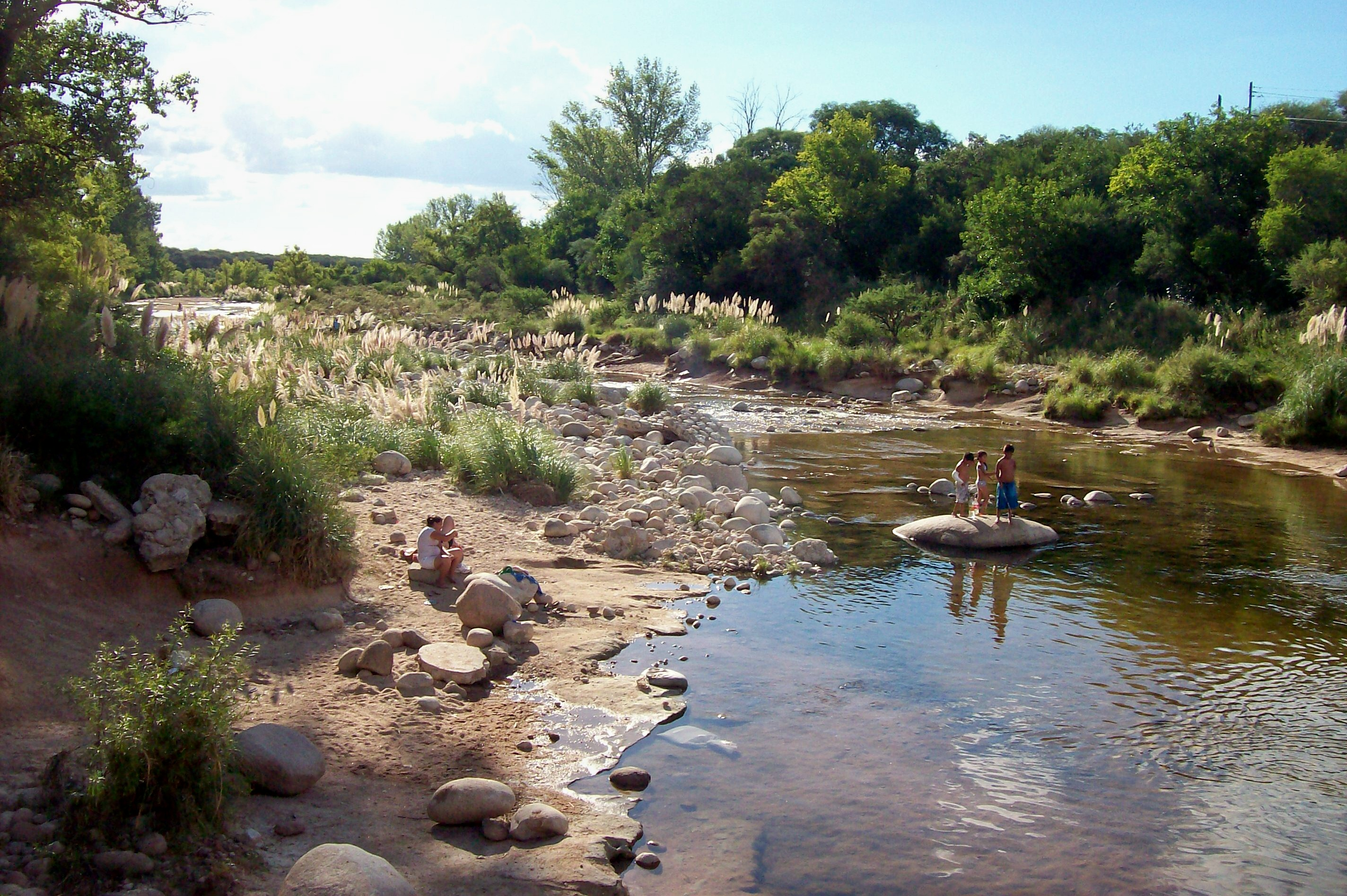 "Paso de las Tropas", en el río chico de Nono, provincia de Córdoba, Argentina.